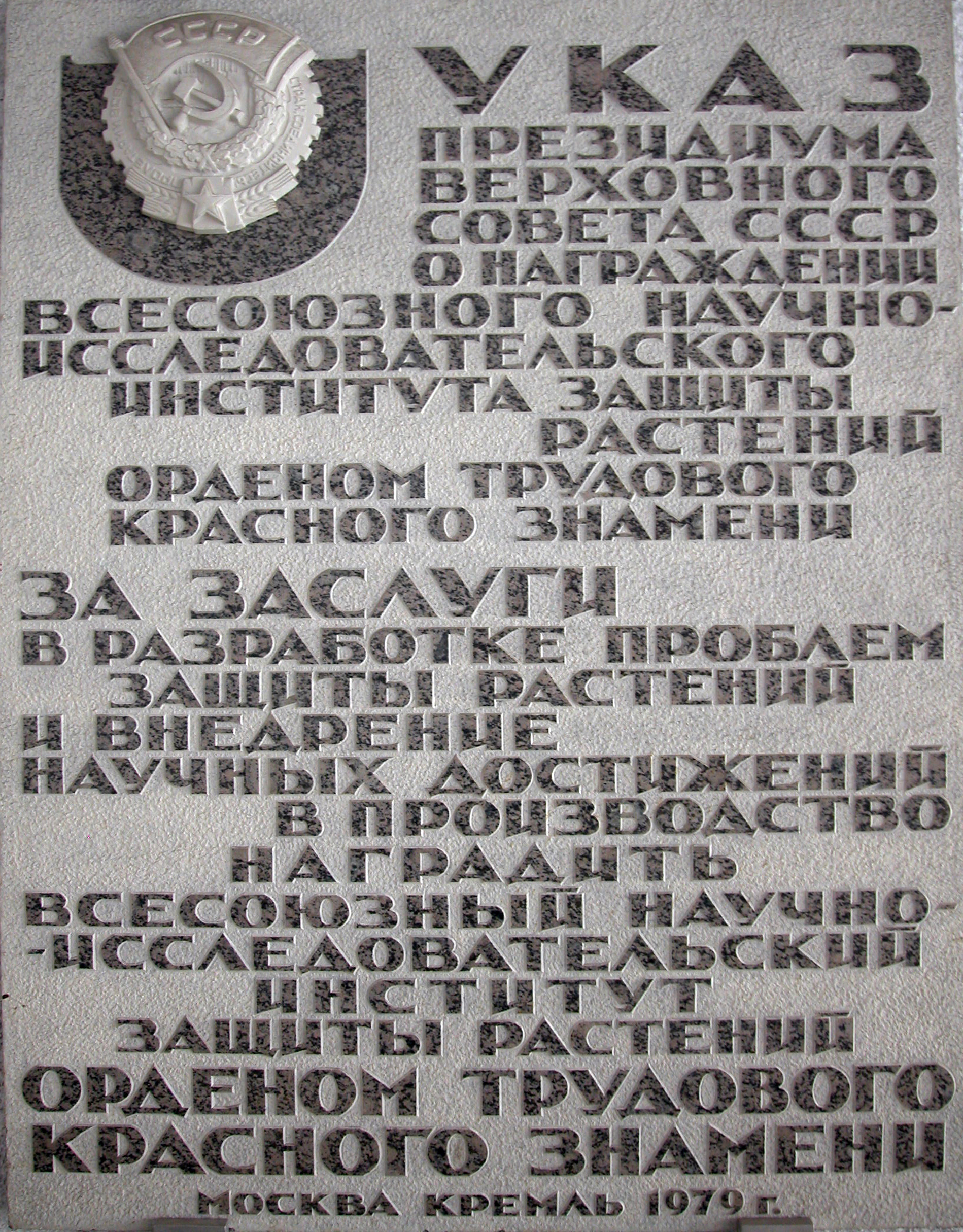 Всероссийский научно-исследовательский институт защиты растений. Памятная доска, установленная в здании ВИЗР в честь награждения института орденом Трудового Красного Знамени